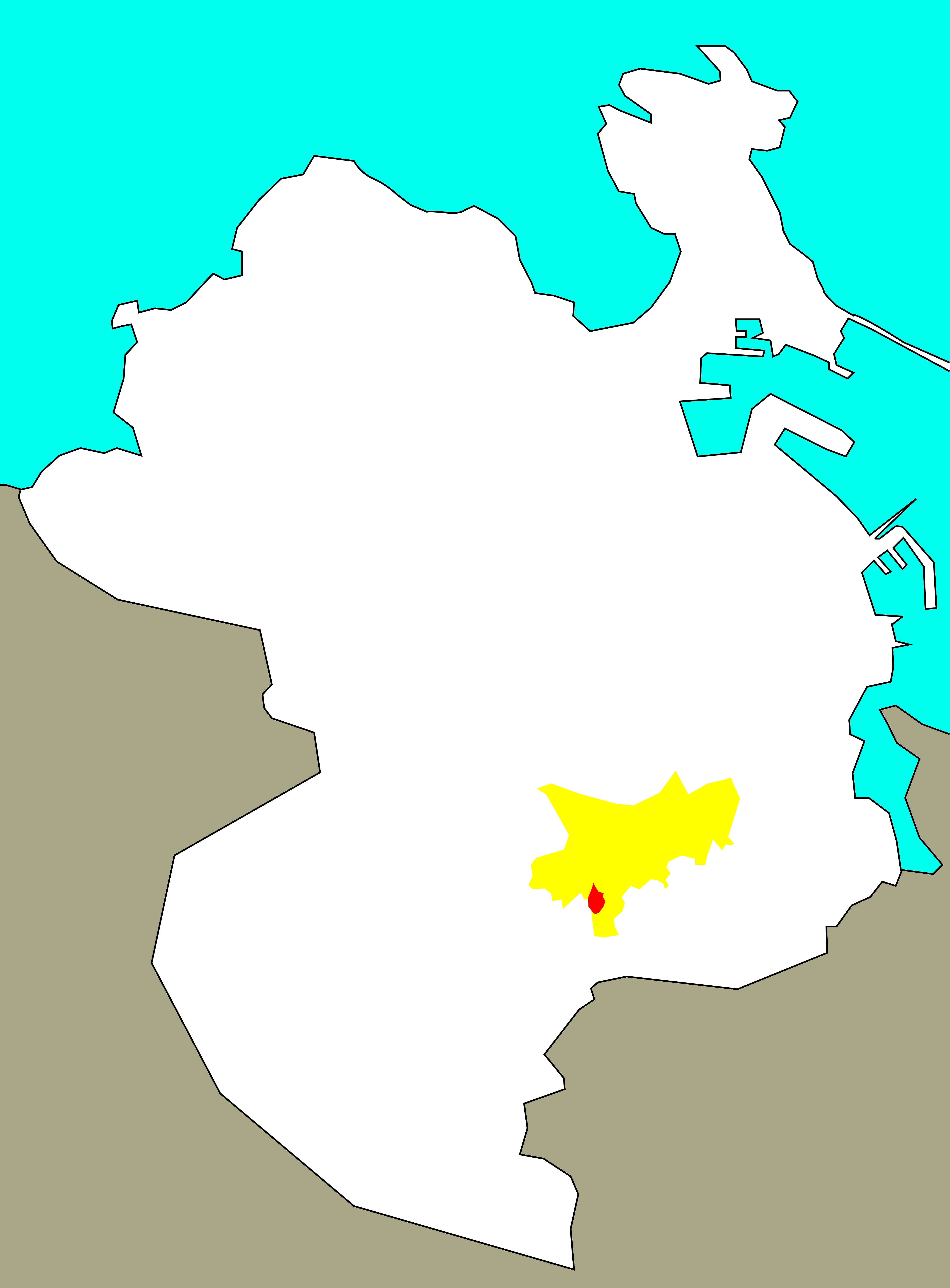 Situación do Souto no "barrio-territorio" de Elviña, segundo